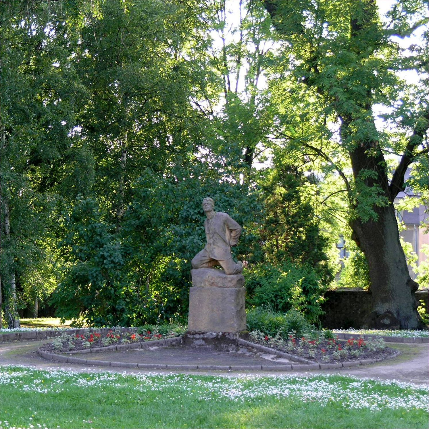 Rumburk 1 - památník Rumburské vzpoury – socha Nepokořený.